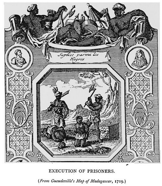 pagina uit Madagascar or Robert Drury's Journal